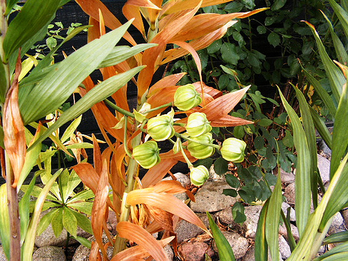 Lilium hansonii seedpods